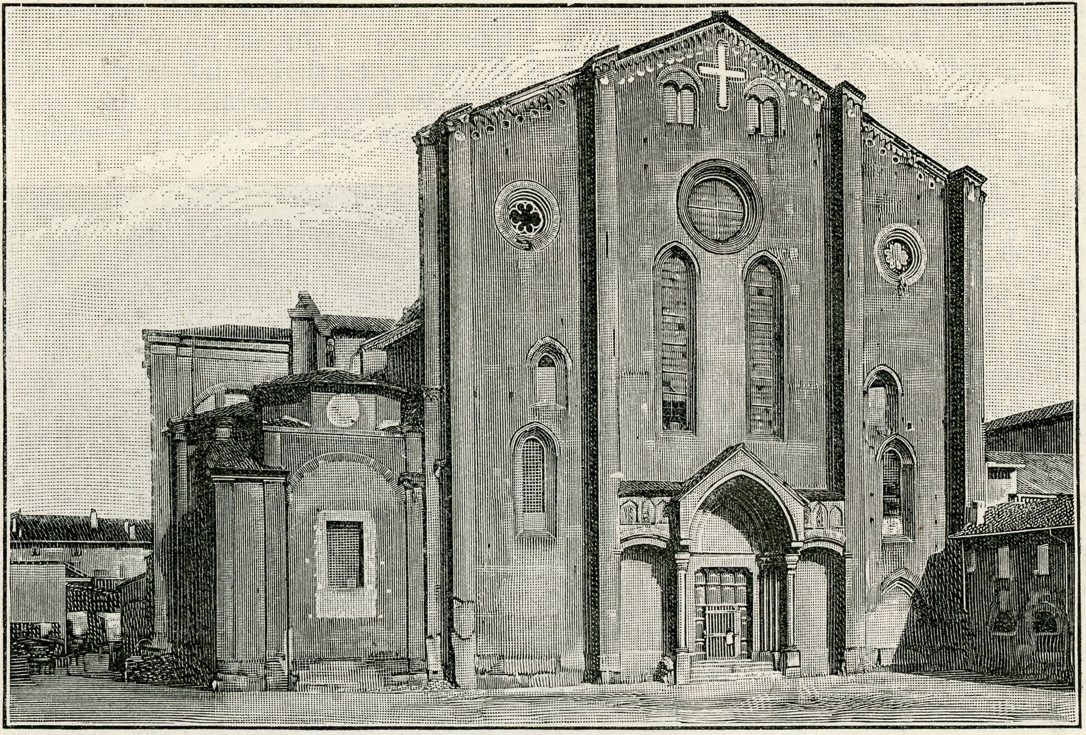 Bologna: chiesa di San Francesco (xilografia).